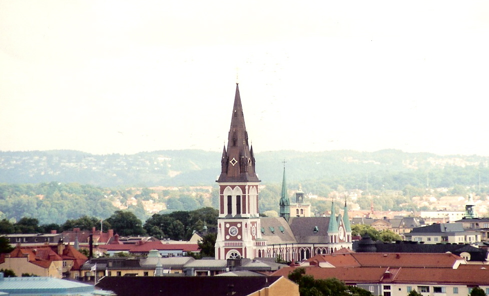 Sofia-Kirche, Jönköping, Blick am Stadtpark, 2001